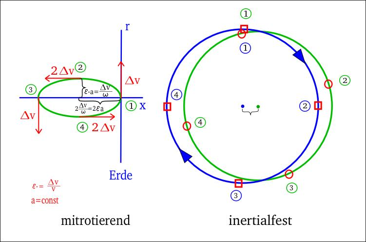 Radiales Bahnmanöver.